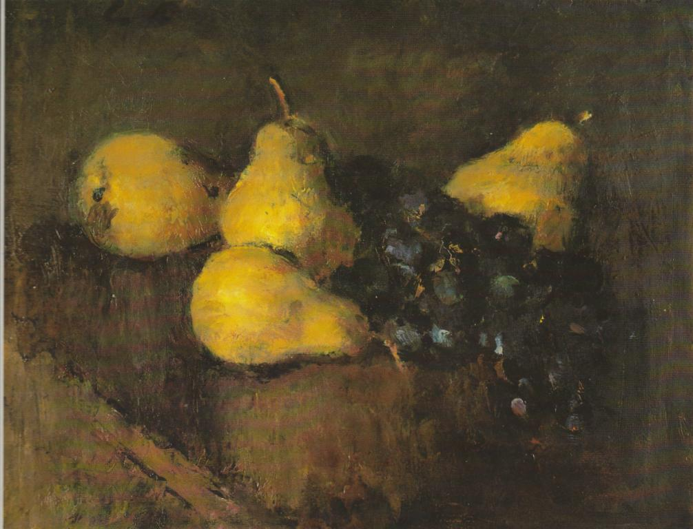 Gelbe Birnentitle QS:P1476,de:"Gelbe Birnen" label QS:Lde,"Gelbe Birnen"